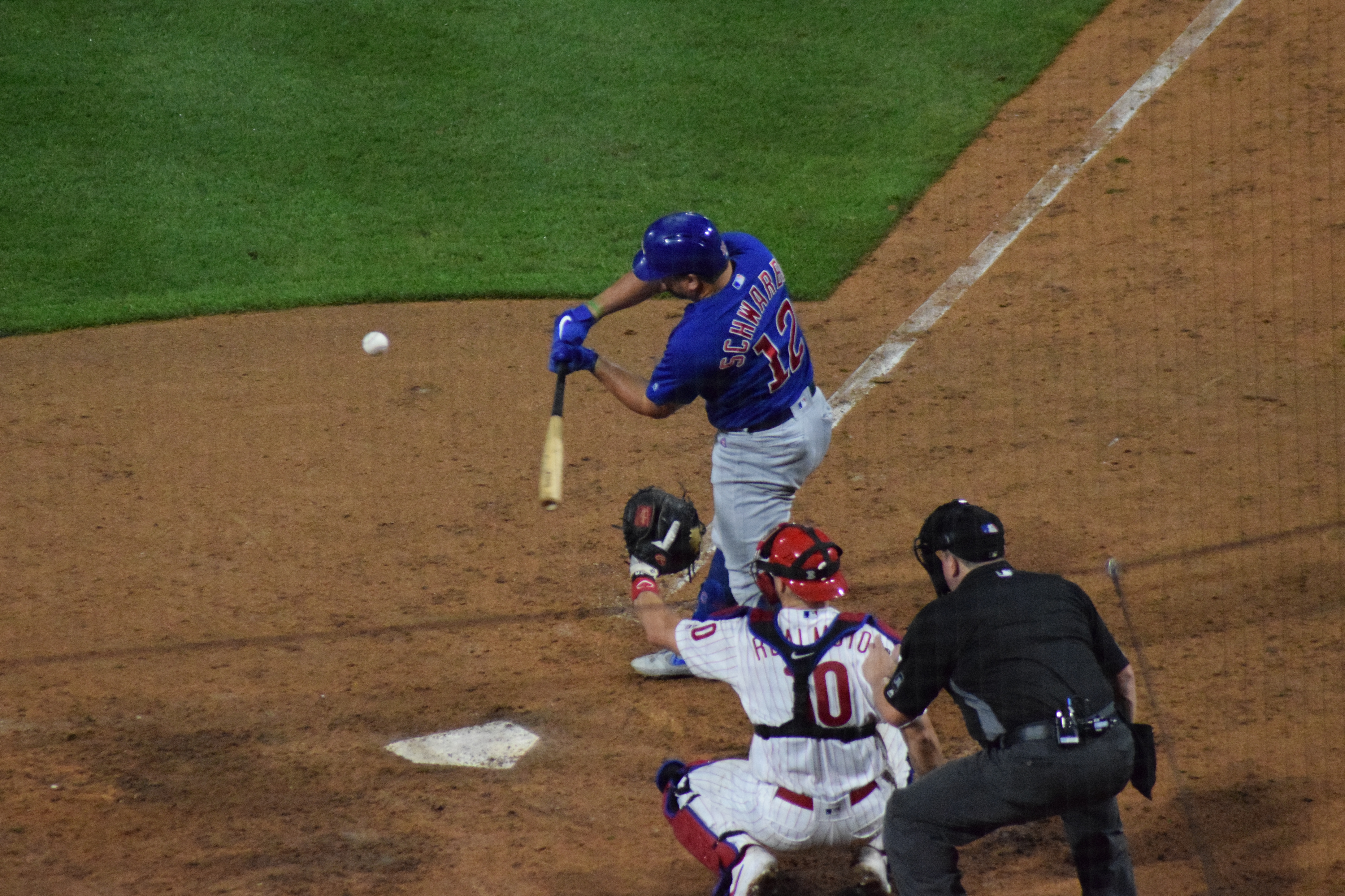 Kyle Schwarber